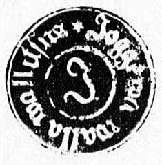 Jõgeva vallavalitsuse pitsat. Üleslaadija koopia ja töötlus